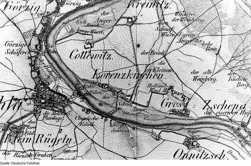 Original image description from the Deutsche Fotothek Zeithain-Lorenzkirch. Oberreit, Sect. Oschatz, 1839/40